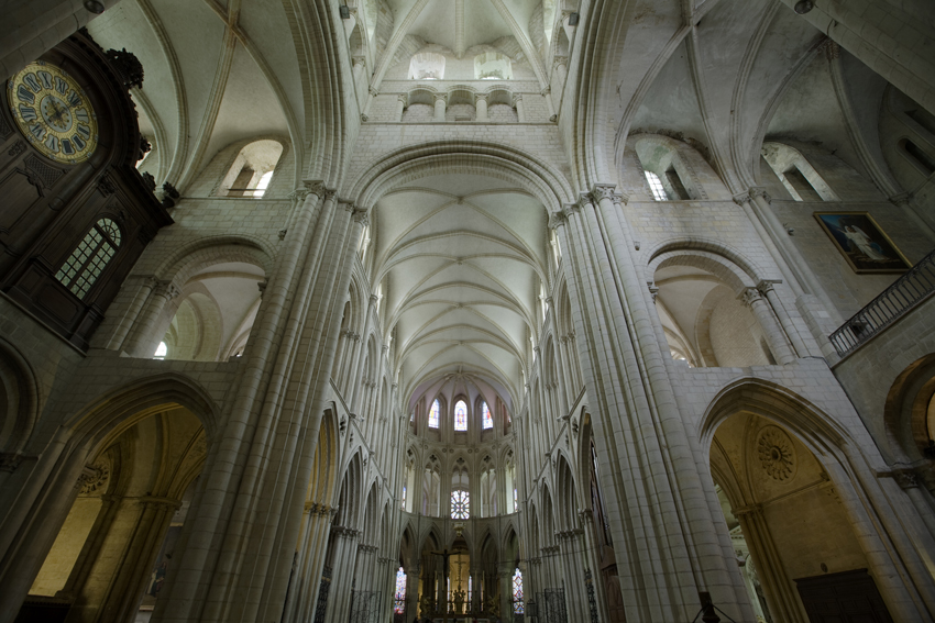 This building is en partie classé, en partie inscrit au titre des Monuments Historiques. .